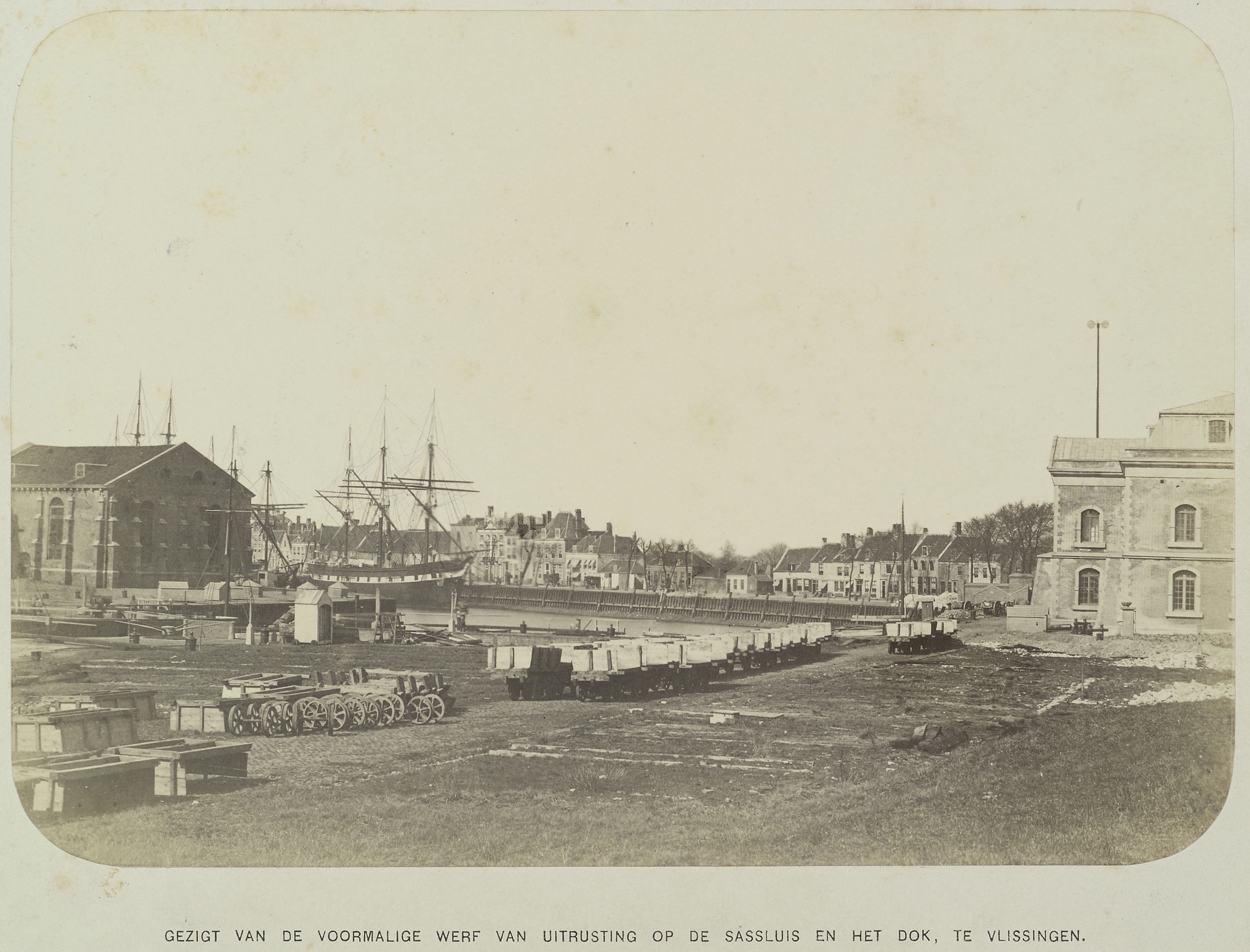 Marinewerf: Overzicht werf met zeilschip en kade met huizen (opmerking: Fotograaf te Middelburg)